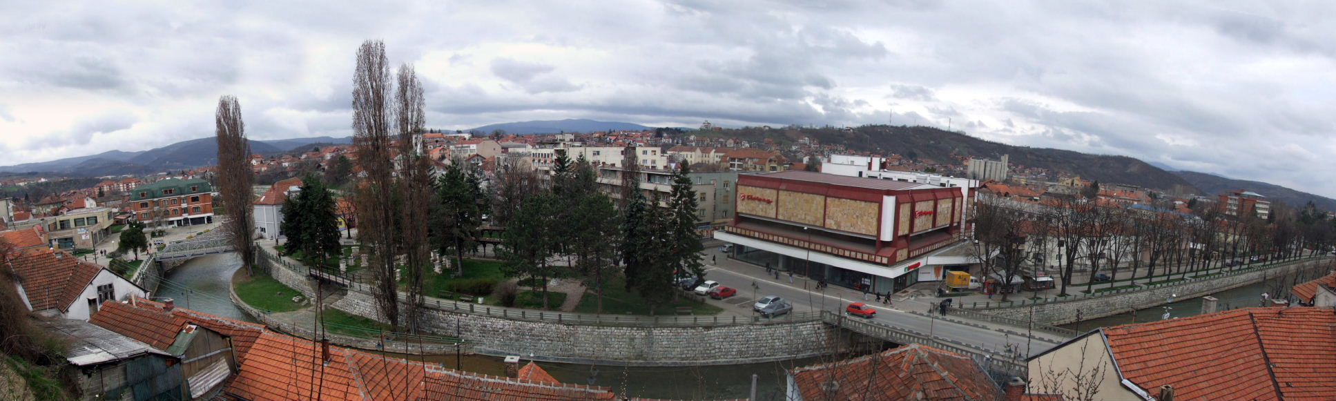 Knjaževac